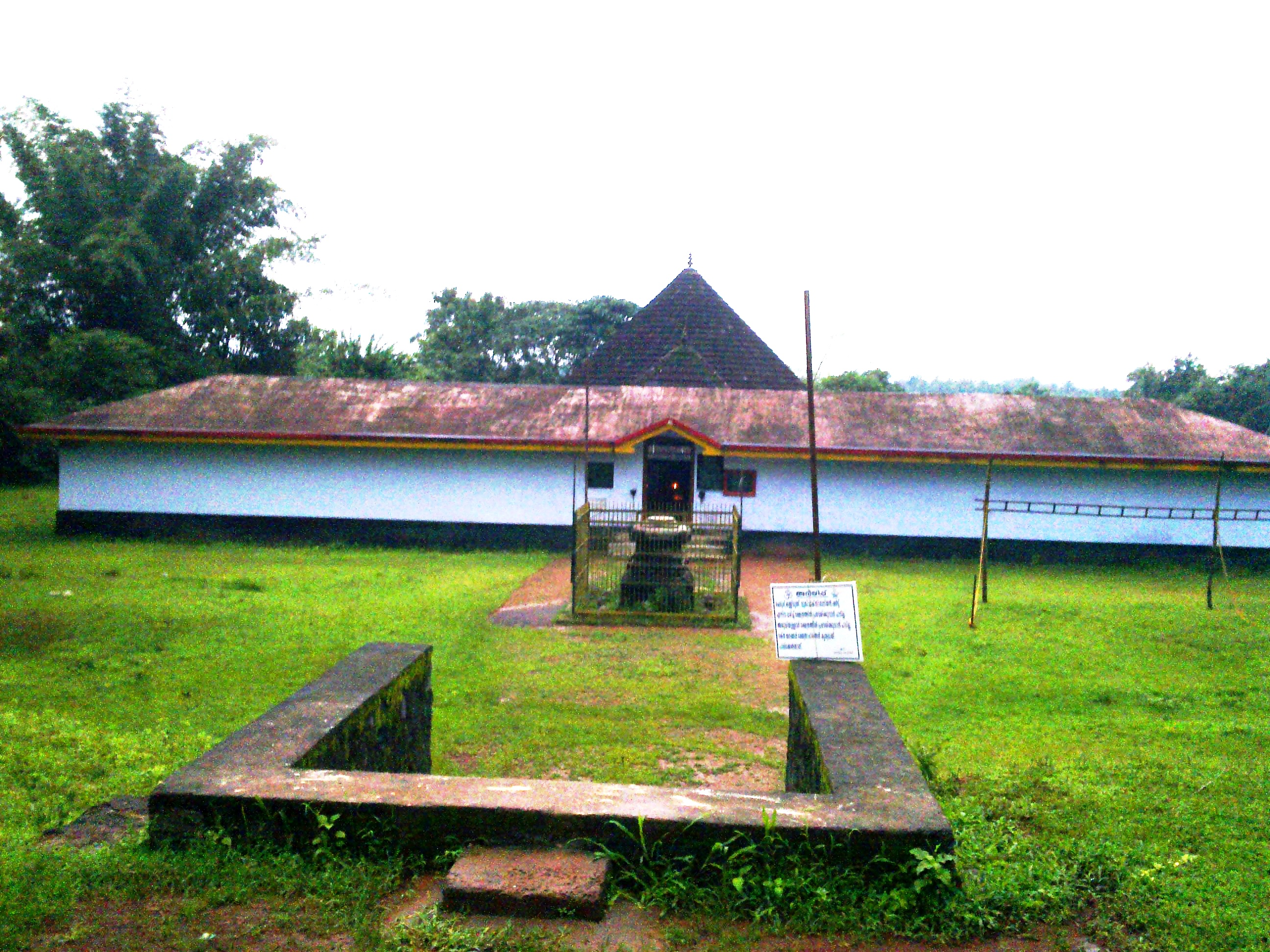 Pannithadam Mathoor Siva Temple പന്നിതടം മാത്തൂർ ശിവക്ഷേത്രം